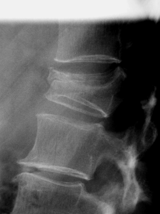 Seitliches Röntgenbild eines gebrochenen Wirbels